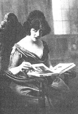 Fotografía de la actriz española María-Fernanda Ladrón de Guevara publicada en 1926 con motivo de su actuación en el Teatro Barcelona.